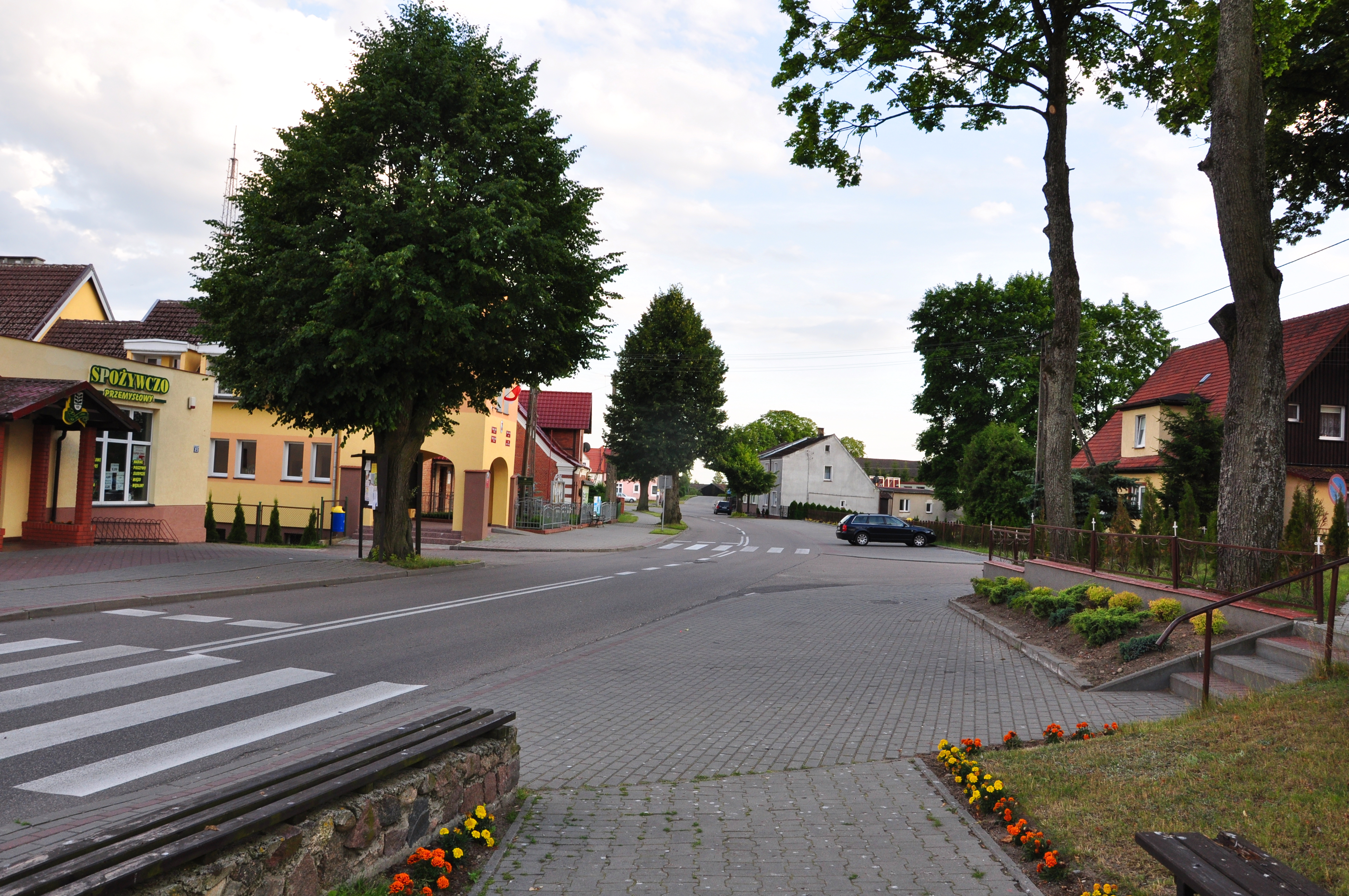 77-220 Koczała, woj. pomorskie, powiat człuchowski Centrum wsi, widok w stronę Człuchowa